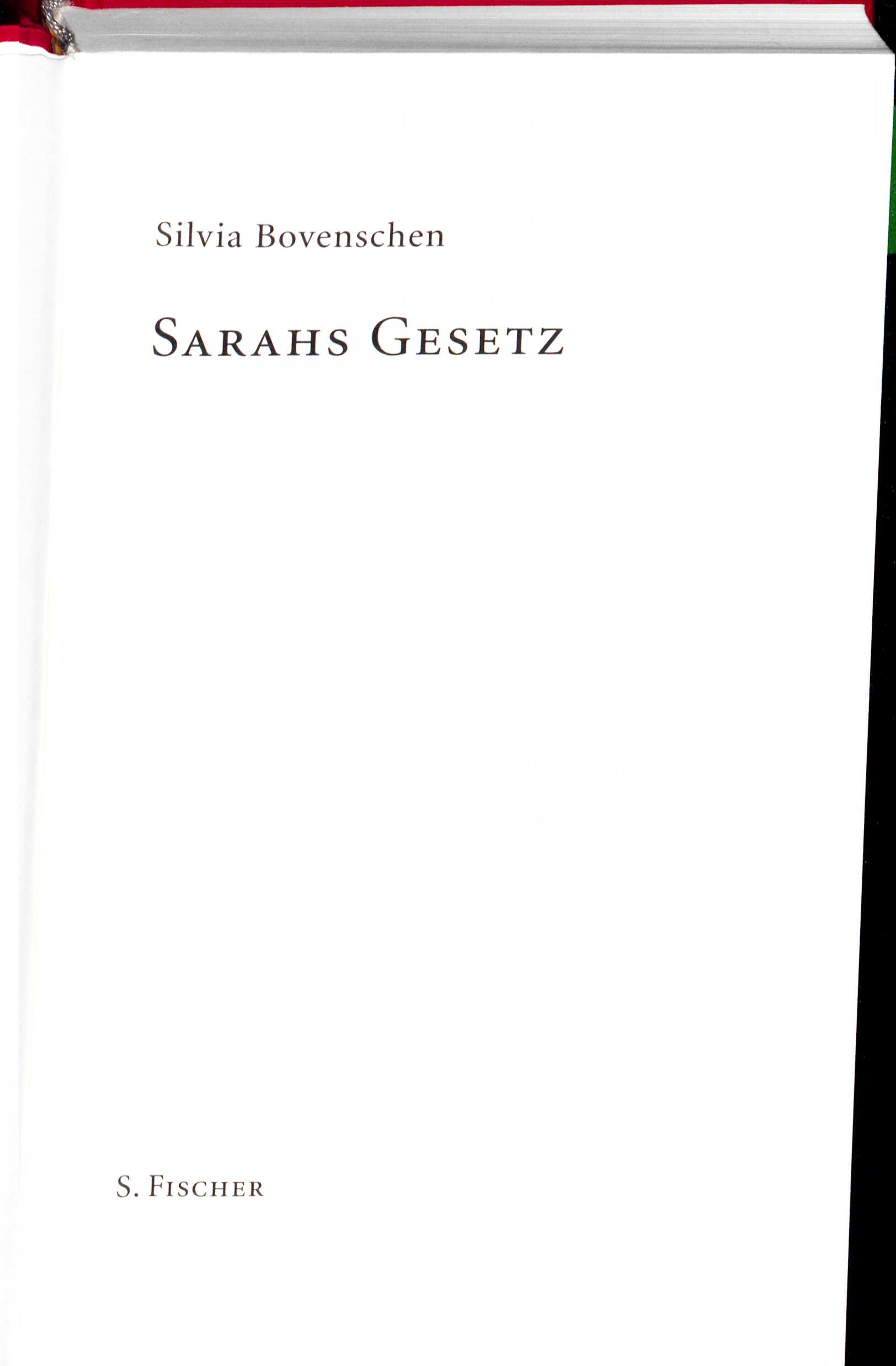 Silvia Bovenschen Sarahs Gesetz 2015 Titel